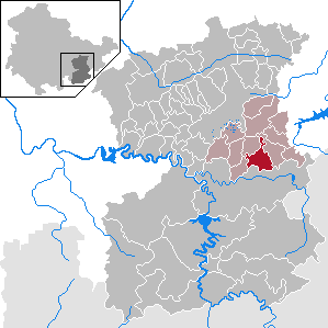 Oettersdorf in Thuringia - Saale-Orla-Kreis